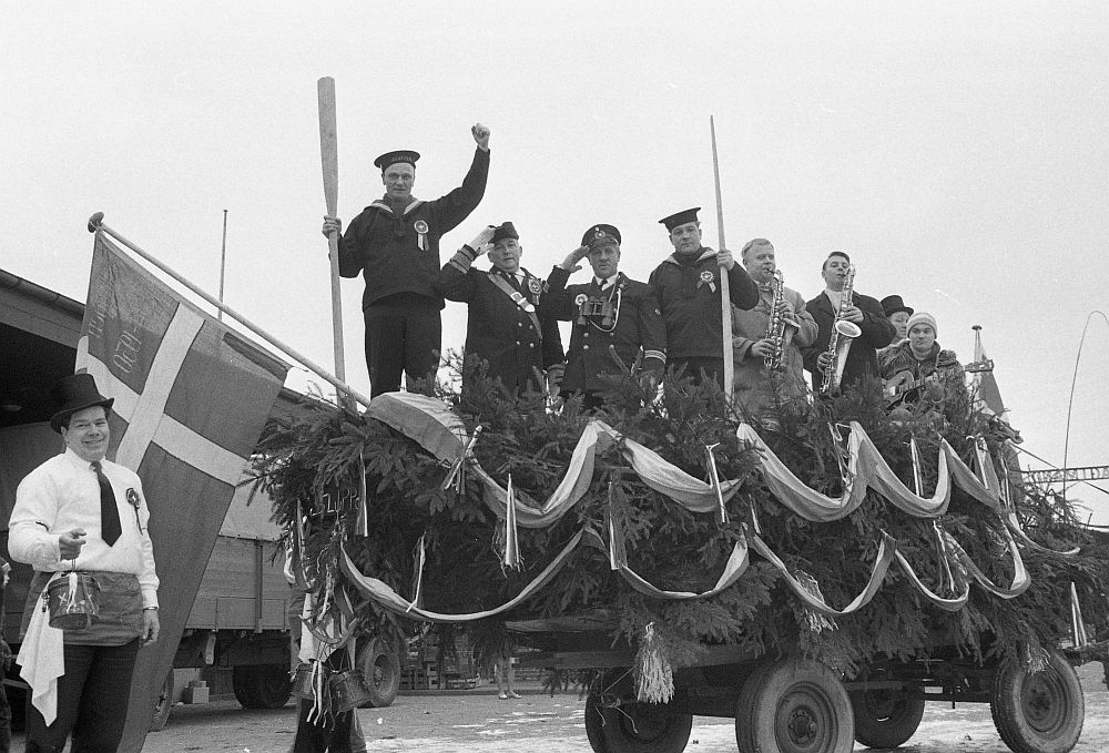 Sluppen, Ib Rahbek-Clausen, 1968